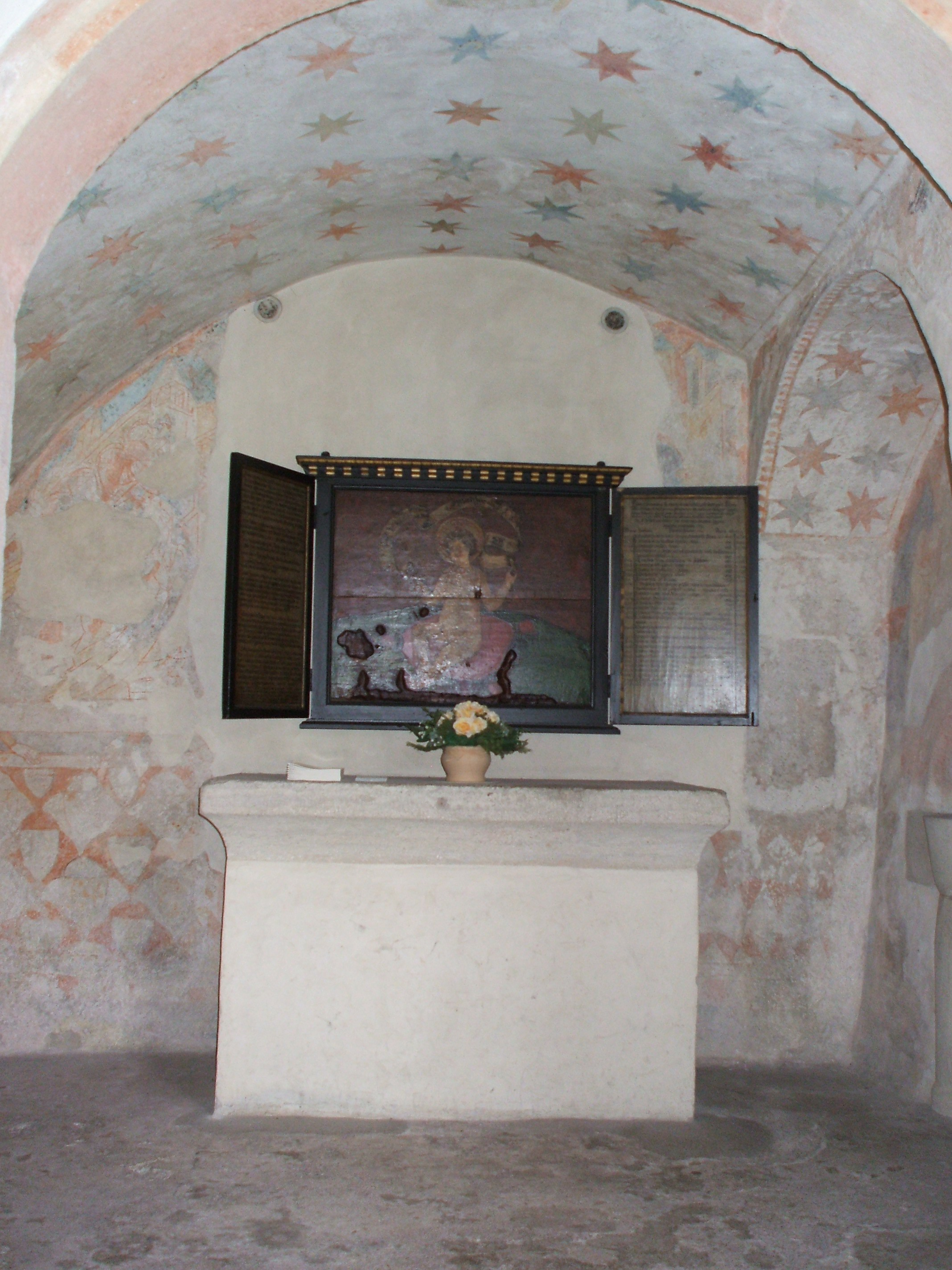 Geöffneter Flügelaltar des Klosters Wettingen.